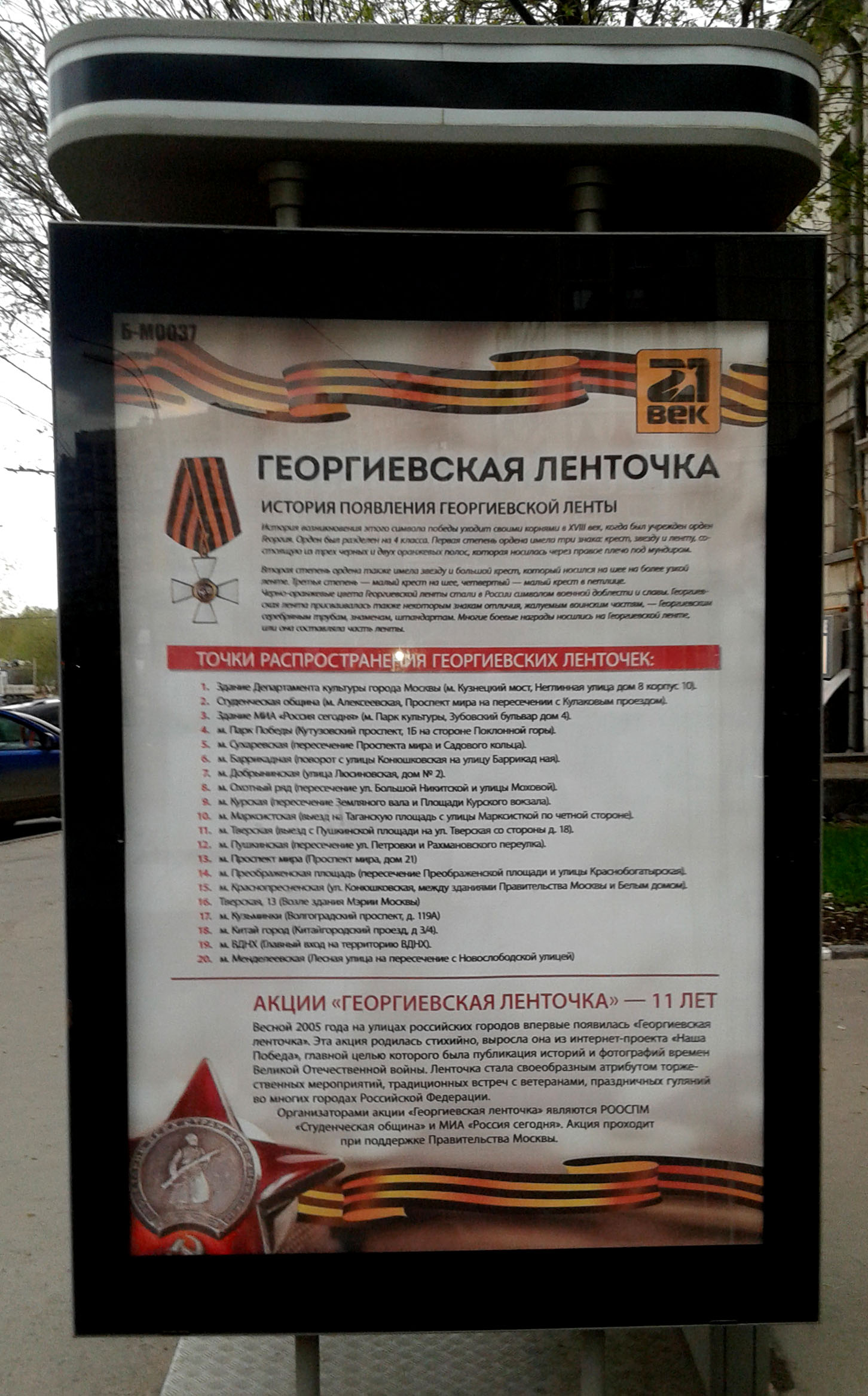 Билборд Георгиевская ленточка в Москве